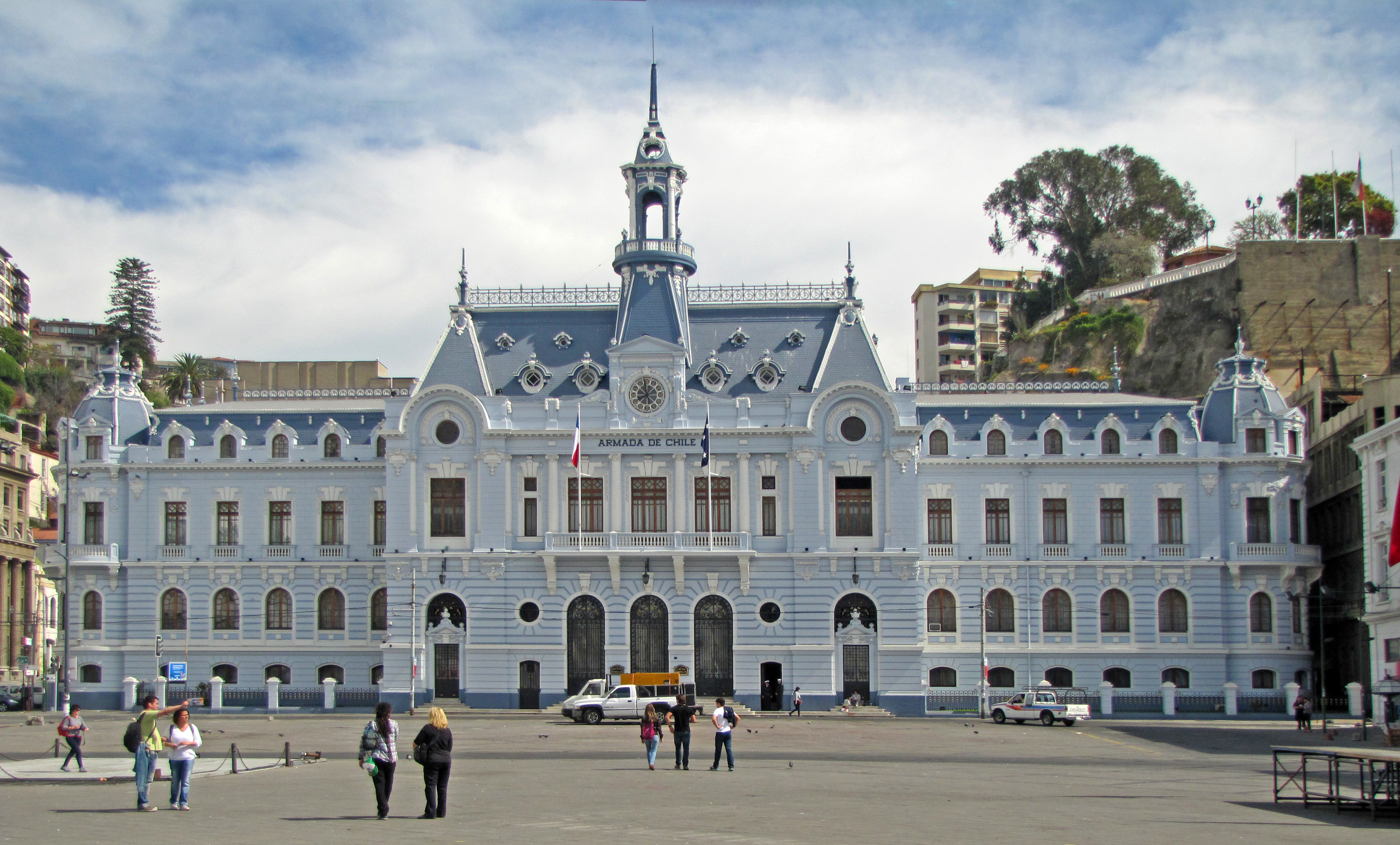 Antigua Intendencia de Valparaíso This is a photo of a national monument in Chile: 617